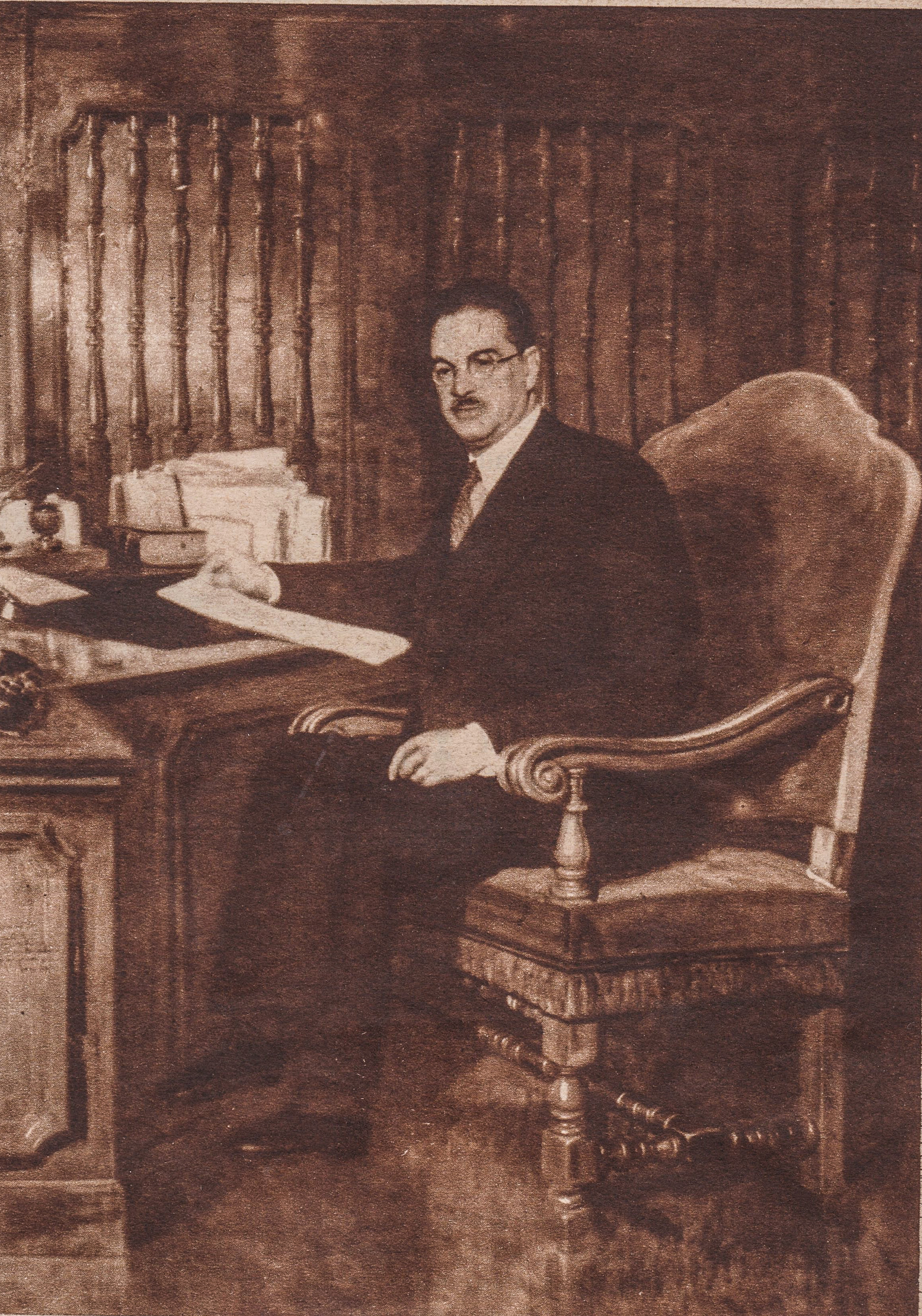 Fotografía de Antonio Pérez Sasia en su despacho del banco central en 1936